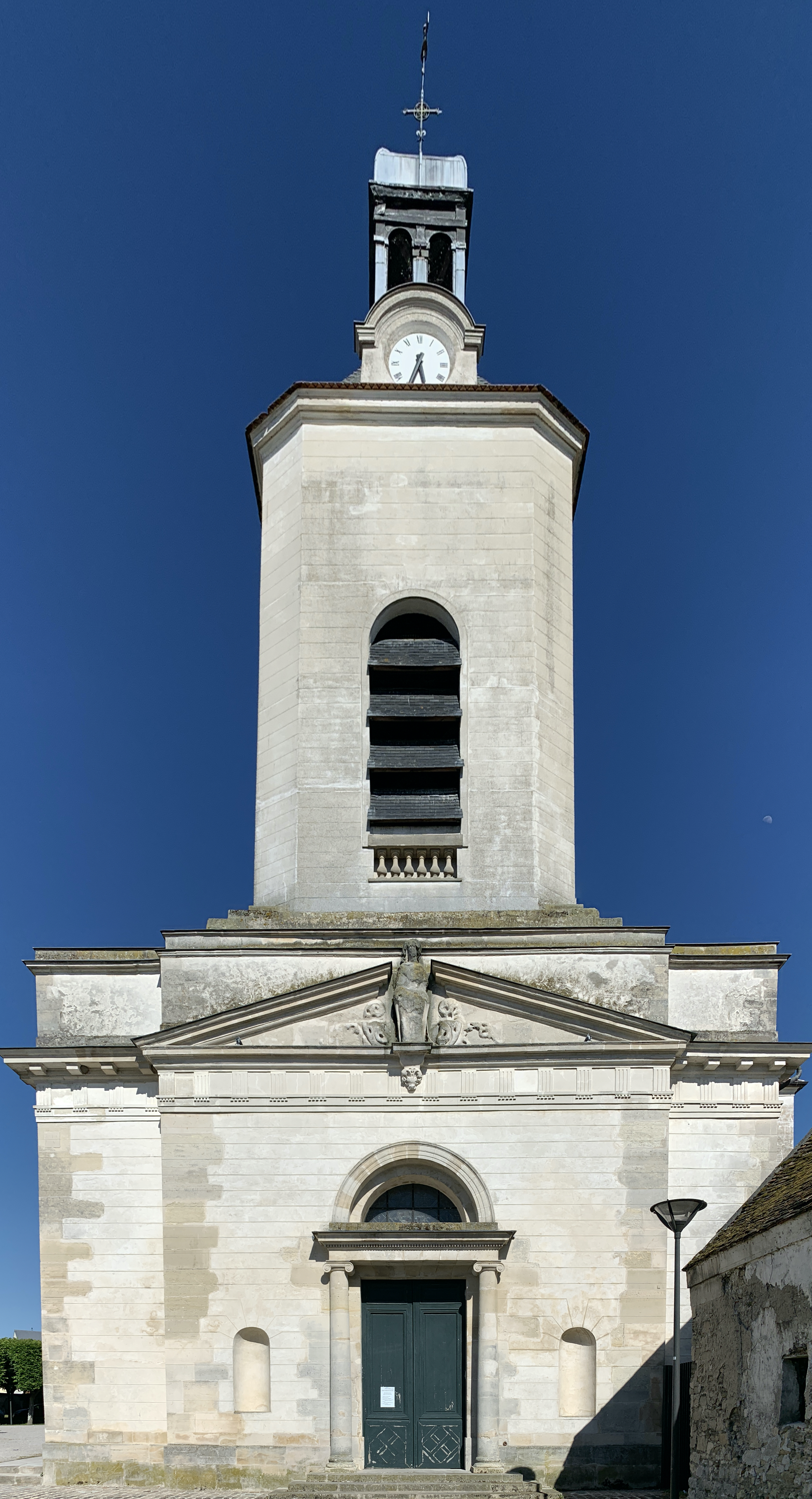 Église Saint-Médard de Tremblay-en-France.